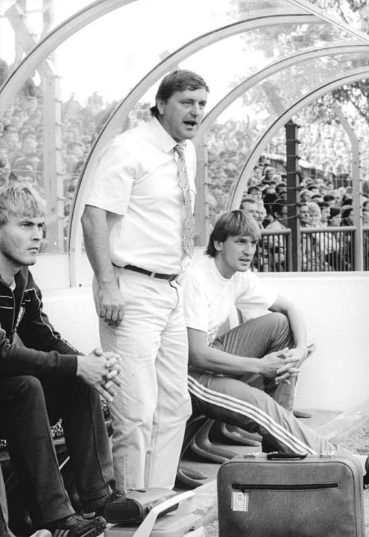 ADN-ZB-Oberst-12.8.89B- Berlin: Neuer Trainer des BFC ist Helmut Jäschke (stehend), der zu Beginn der neuen Oberligasaison noch viel Arbeit mit seiner Mannschaft hat. Neben ihm der noch immer verletzte Mannschaftskapitän Frank Rohde. Jäschke war bisher Trainer der zweiten Mannschaft des Klubs gewesen.